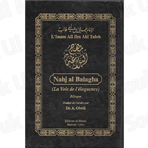 Voie de l'éloquence